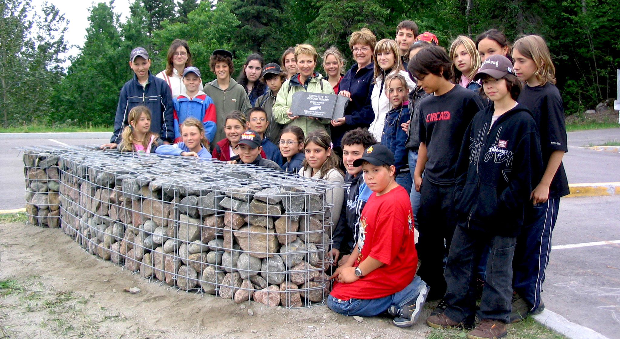 Il s'agit du Tacon-Site du Génome Humain réalisé par le duo d'artistes Interaction Qui (A. Laroche et J. Maltais) en 2005. C'est le quatrième Tacon-Site réalisé dans le cadre du projet Événement-Ouananiche. Il porte le numéro 04 et appartient à la Municipalité de Jonquière (Saguenay, Québec, Canada).